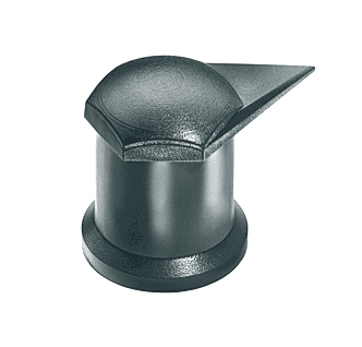 Beim Dustite LR befindet sich der Zeiger am oberen Ende des Schafts, sodass er bei Zugmaschinen und Felgen mit Rad-Zierblenden angewendet werden kann. Funktionsweise wie bei Checkpoint und Dustite